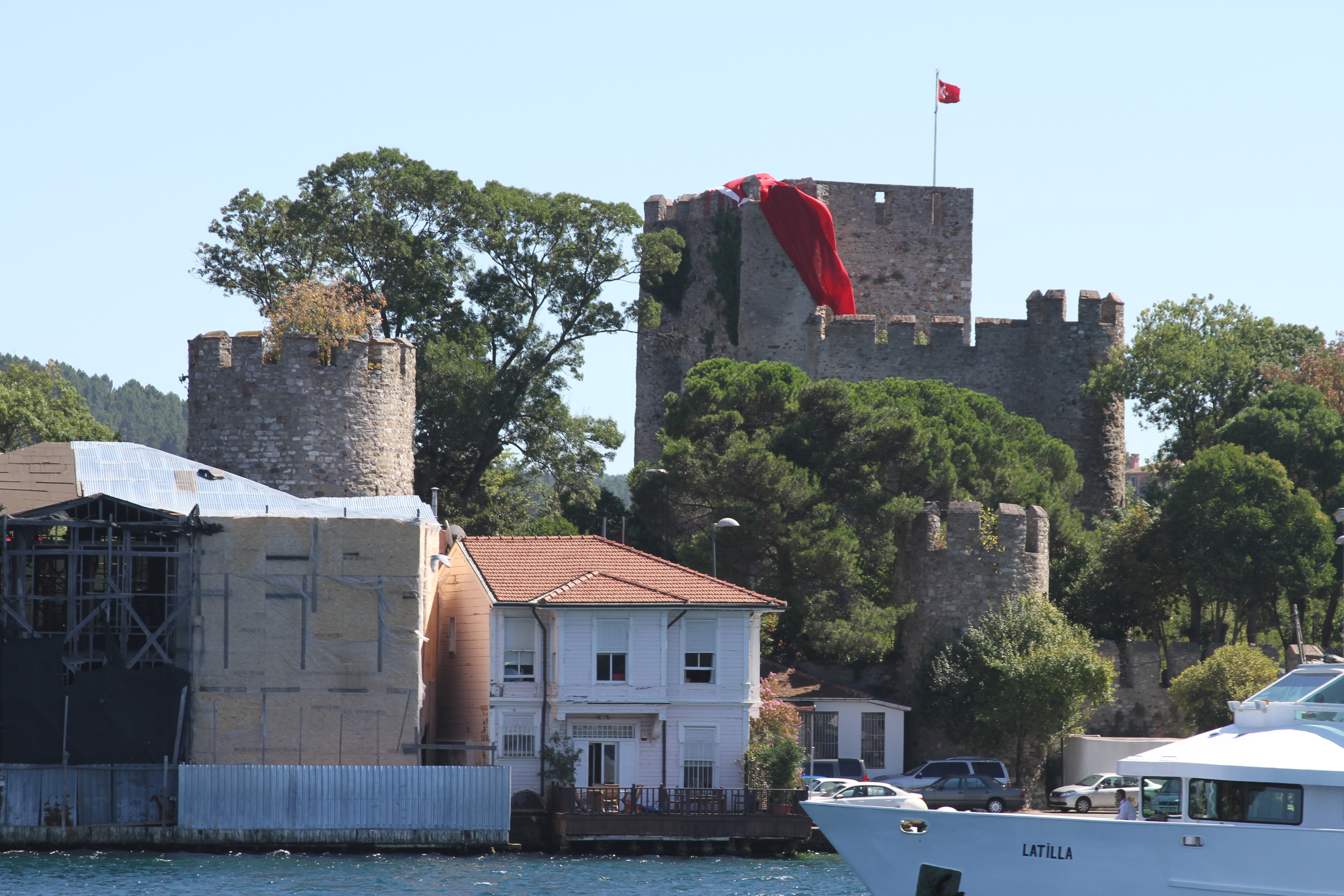 Vista de Anadolu Hisarı ("Fortaleza Ásia") do Bósforo